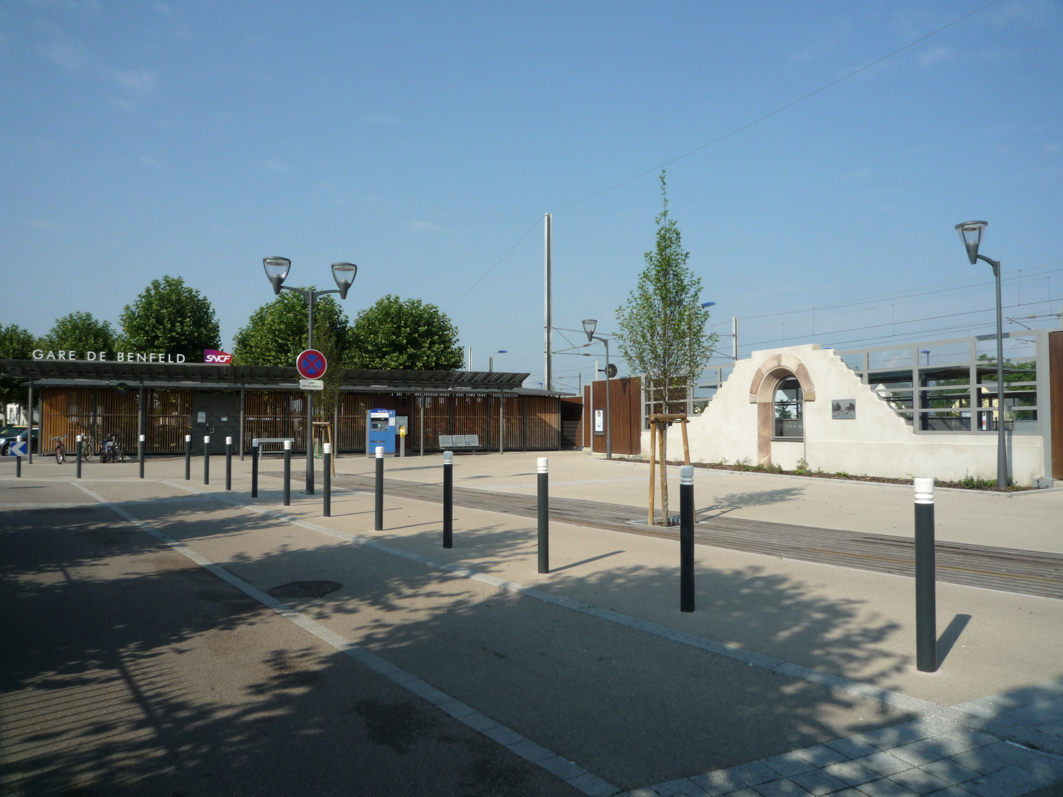 La gare de Benfeld, située en Alsace dans Bas-Rhin (67), est une halte de la Société Nationale des Chemins de Fer.